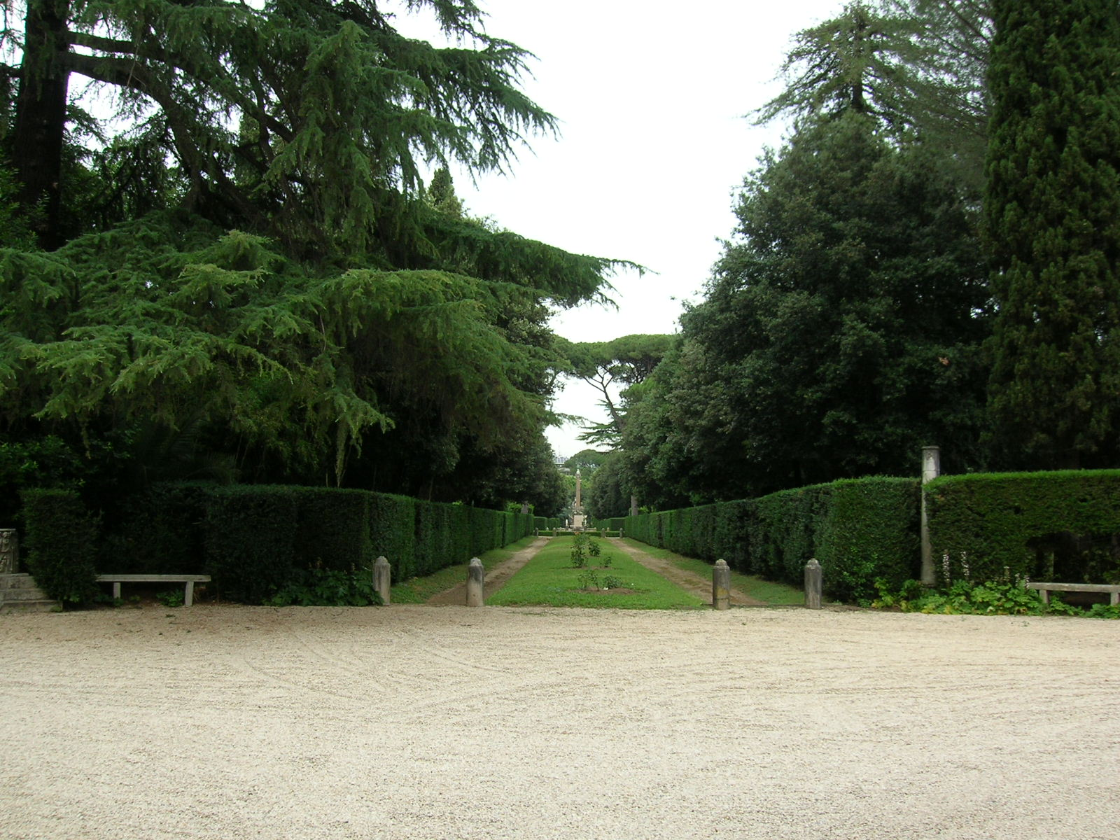 Villa Albani Roma (foto dall'ingresso)